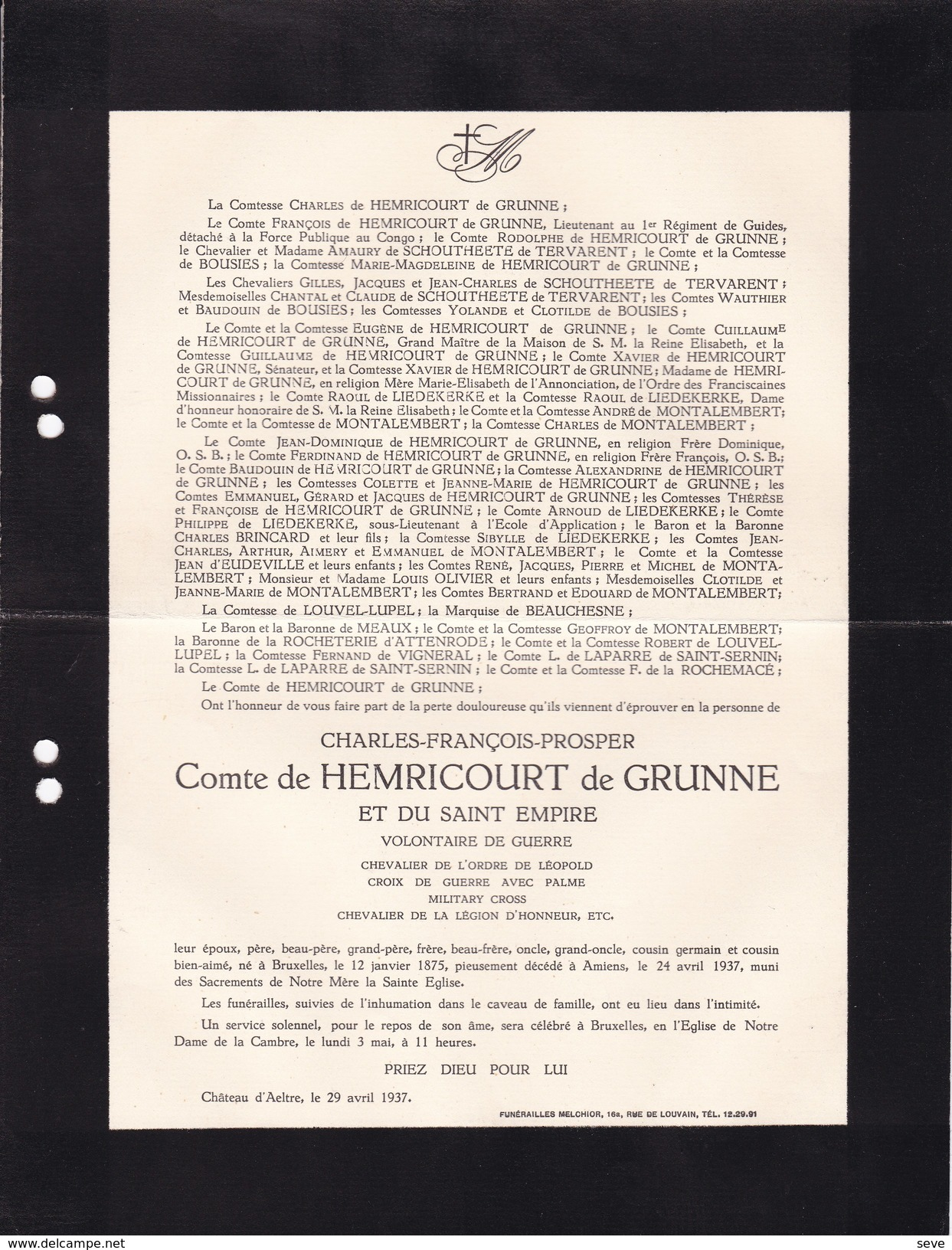 Avis de décès de Charles de Hemricourt de Grunne publié le 29 avril 1937 et composé par Funérailles Melchior, 18a, Rte de Louvain, Tel. 12.29.91